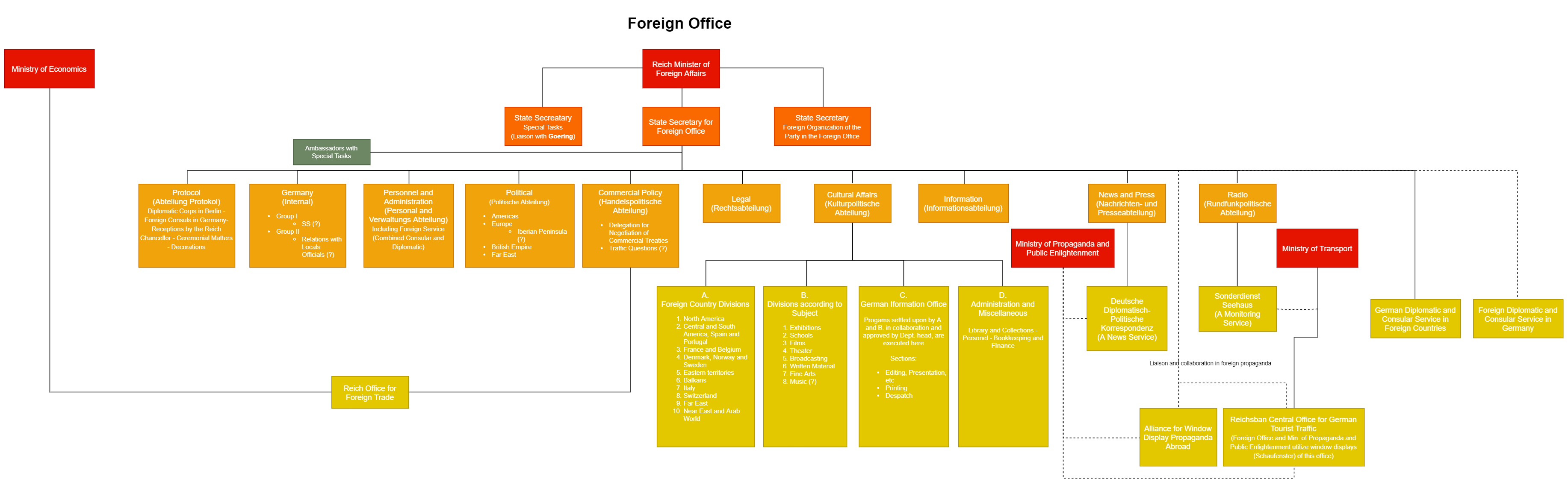 Nazi Germany Foreign Office. Based on: United States. 1945. Organization charts of the German ministries and central agencies. Dotted lines : indirect control, liaison or collaboration.